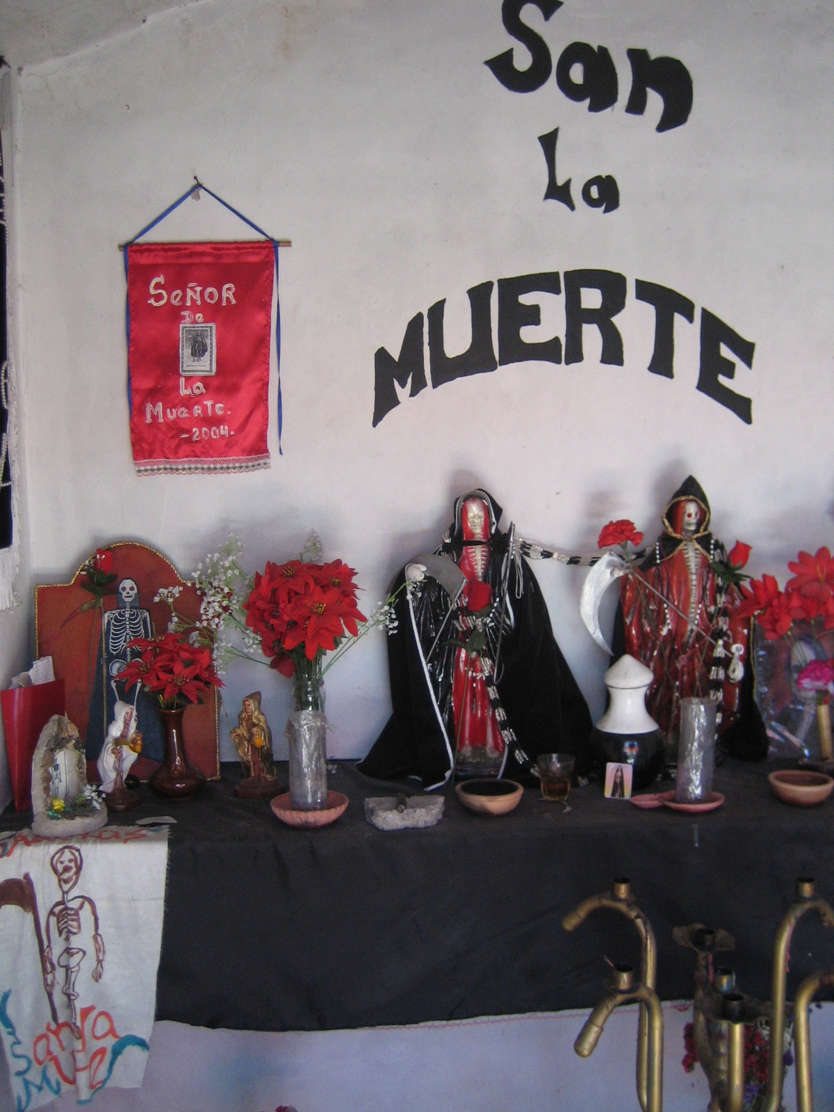 Célébration populaire de la "Sainte Mort" en Argentine (Nord est du pays) en 2004